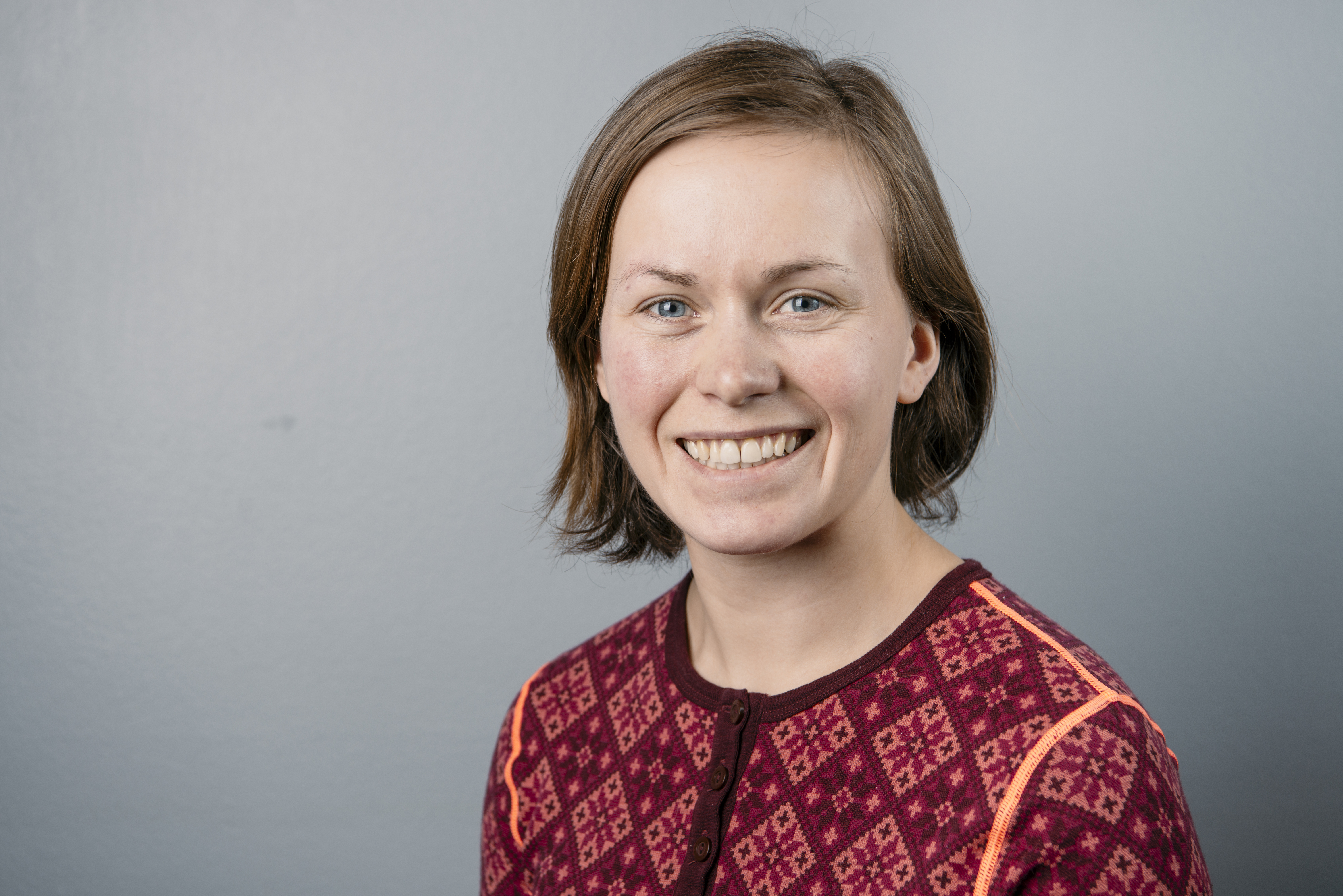 Solfrid Lerbekk